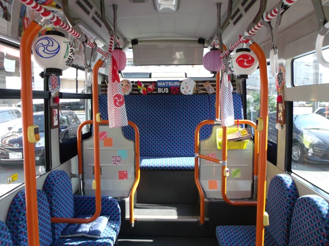 AKIBA SHUTTLE専用車車内（まつりバス装飾時）